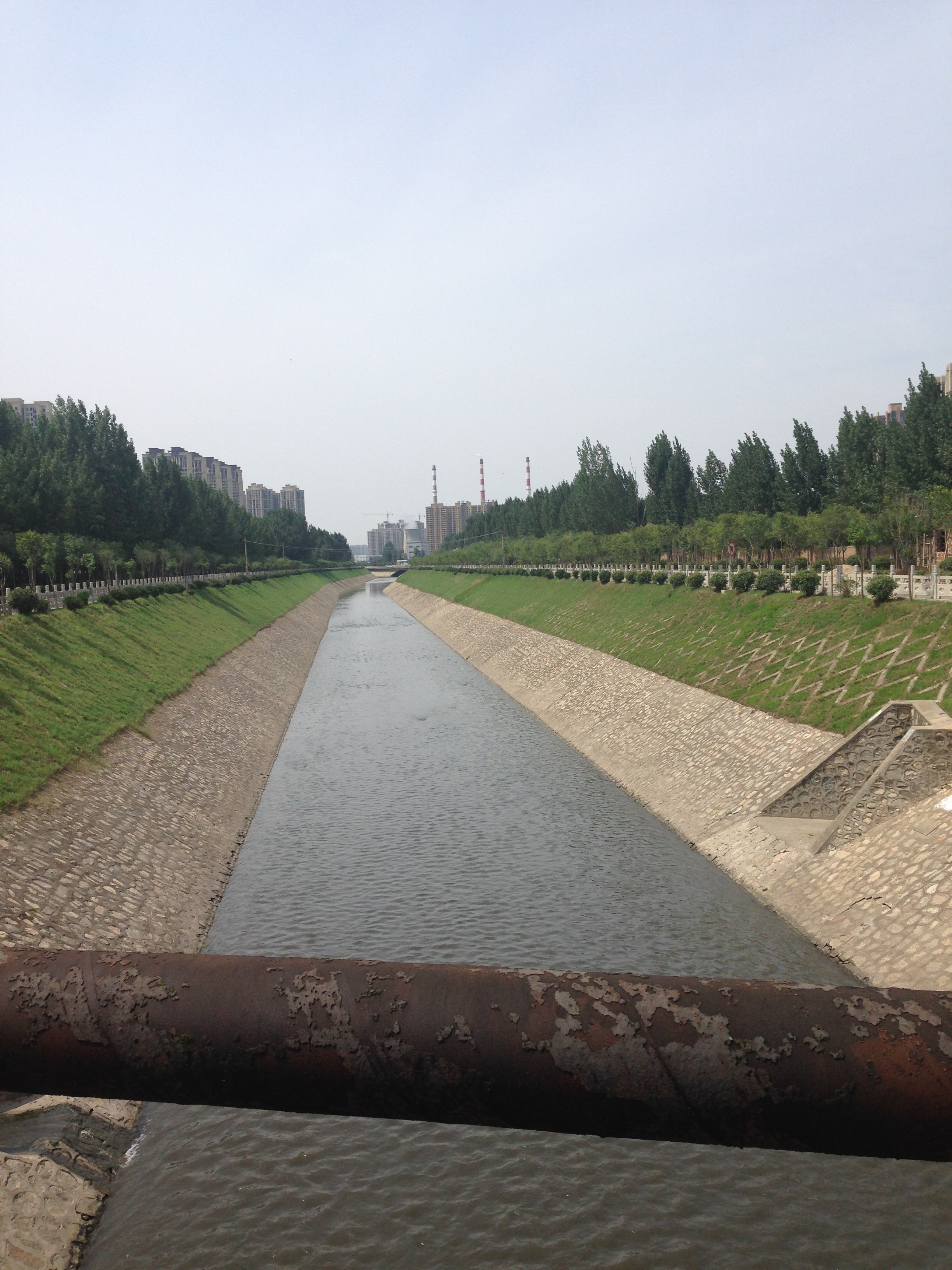 在西安市雁塔区富裕路上向北看皂河